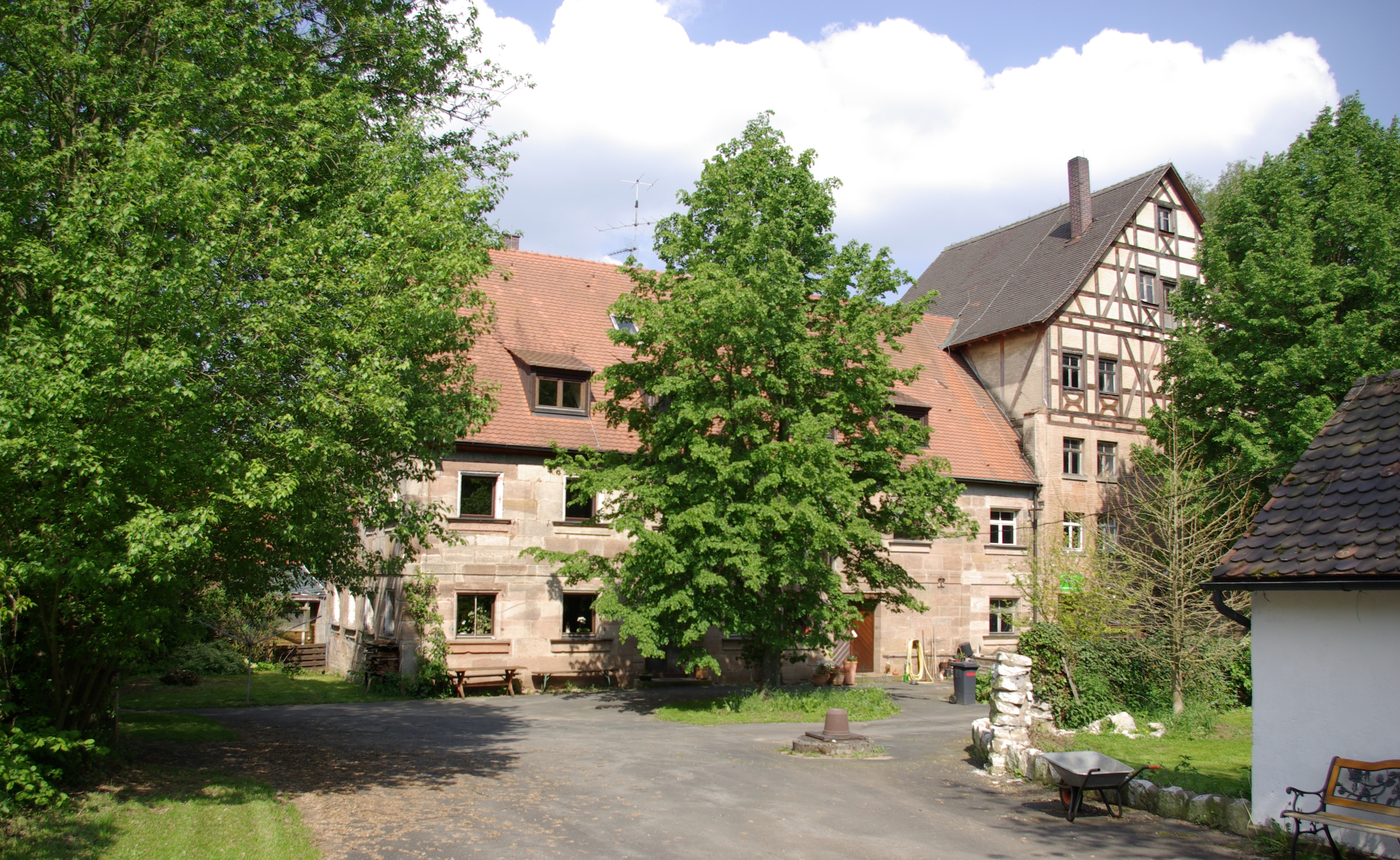 Königsmühle mit dem 1743 errichteten zweigeschossigen Wohnhaus aus Sandstein an der Gründlach im Erlanger Stadtteil Eltersdorf.